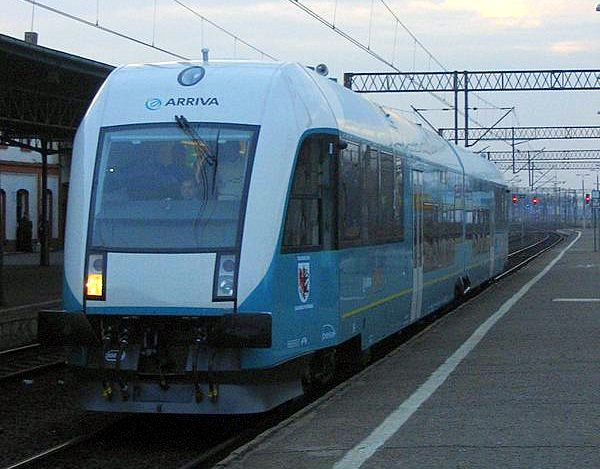 szynobus SA134-001 spółki PCC/Arriva na stacji Toruń Główny w pierwszy dzień kursowania